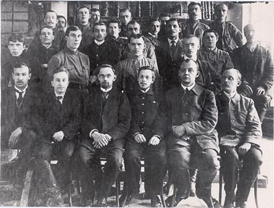 А. Е. Арбузов (третий в нижнем ряду) среди производственников на заводе братьев Крестовниковых.